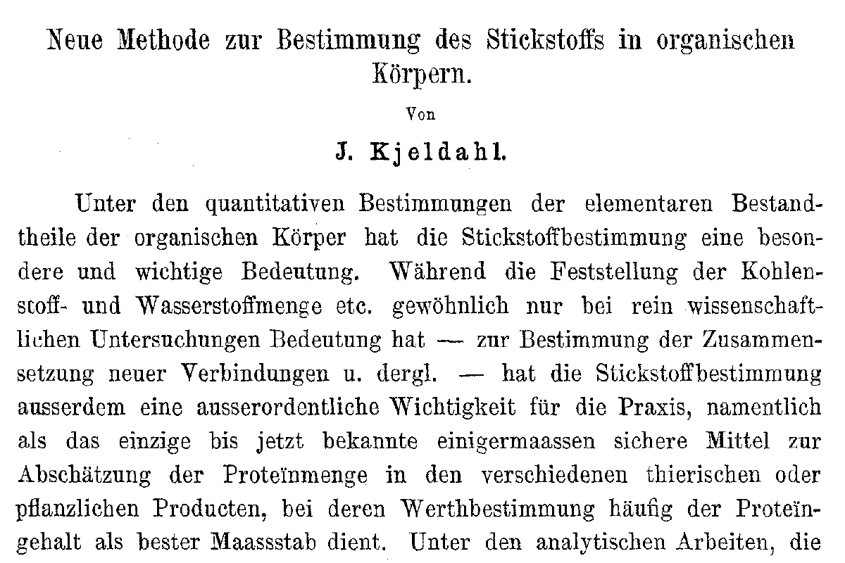 Ausriss aus einer Veröffentlichung des dänischen Chemikers Johan Kjeldahl aus dem Jahr 1883 (Neue Methode zur Bestimmung des Stickstoffs in organischen Körper. In: Zeitschrift für Analytische Chemie. 22(1)/1883. S. 366–382